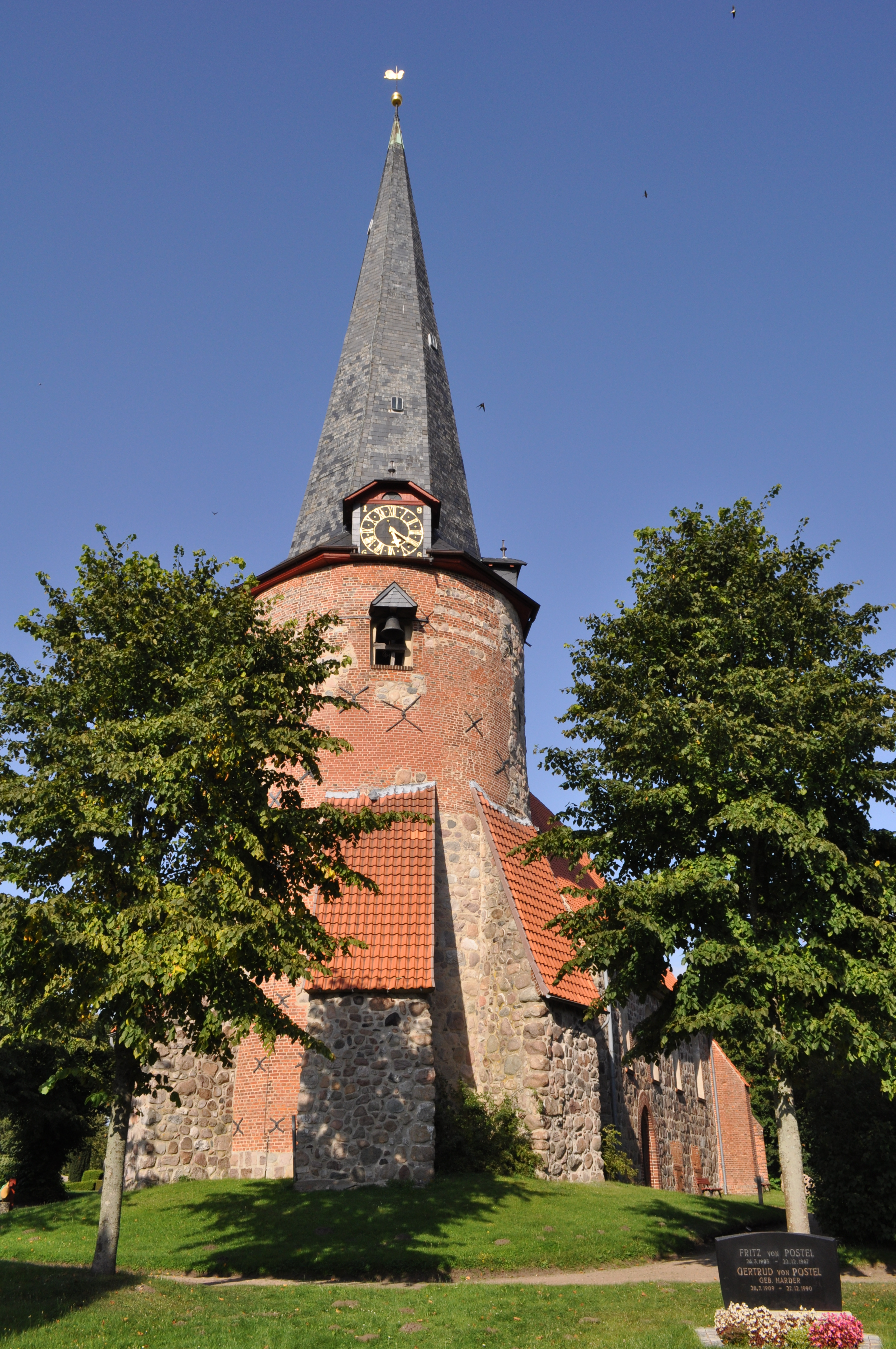 Blick von Südwesten auf die Vicelinkirche in Pronstorf. This is a photograph of an architectural monument. .1